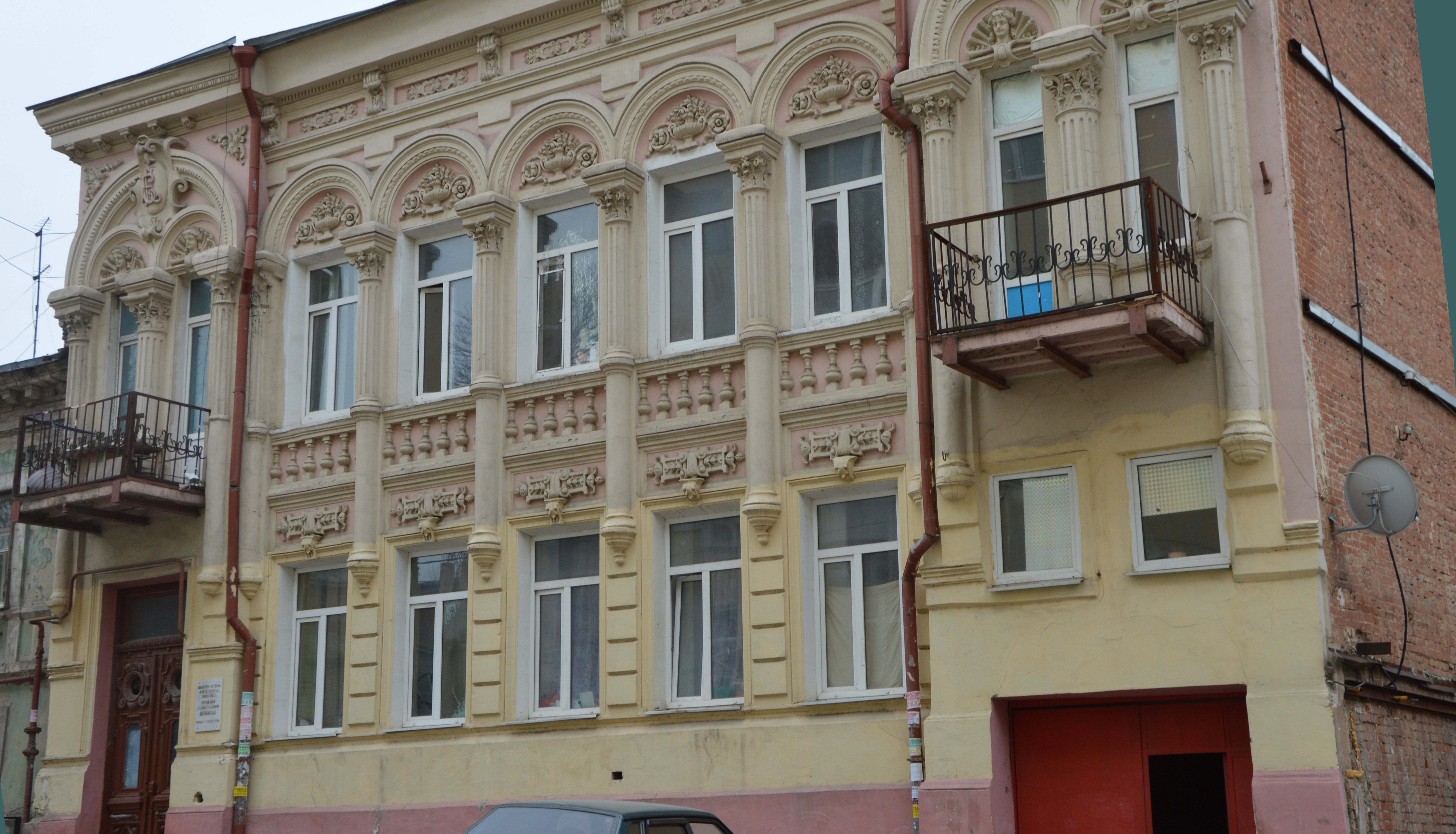 Здание города Ростова-на-Дону